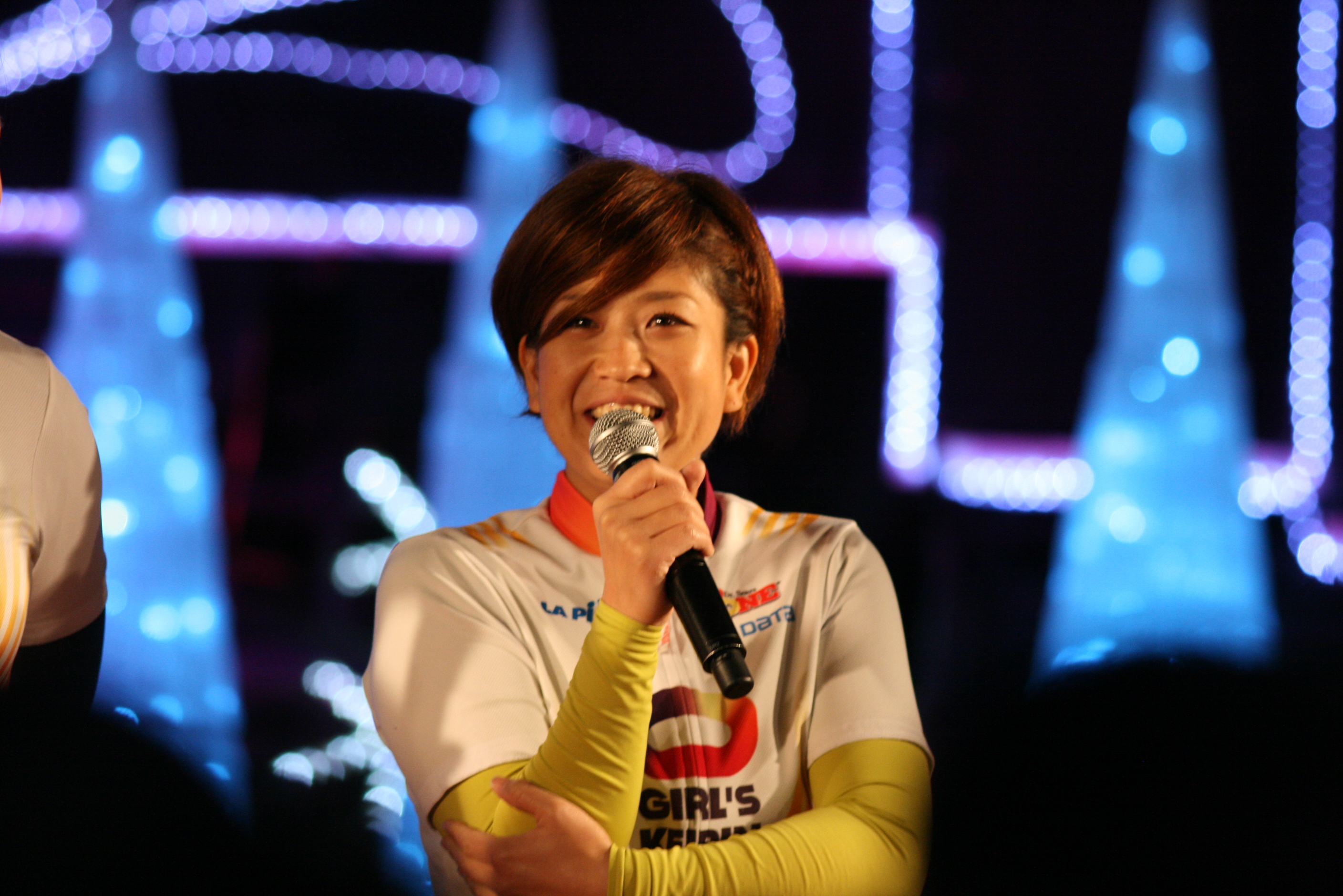 猪子真実 14/11/17 2014新橋イルミネーションフェスタ にて